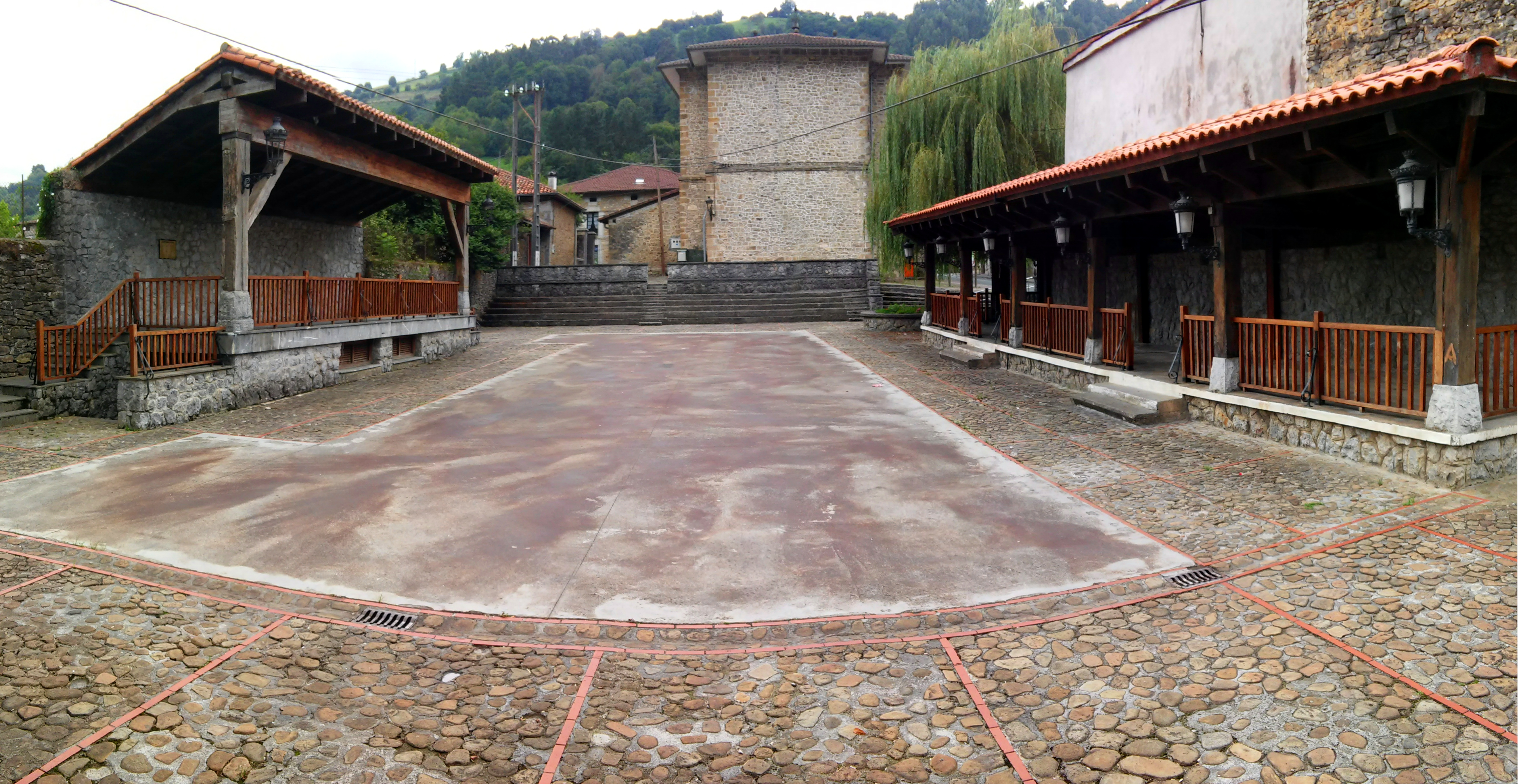 Lanestosako Plaza Berria